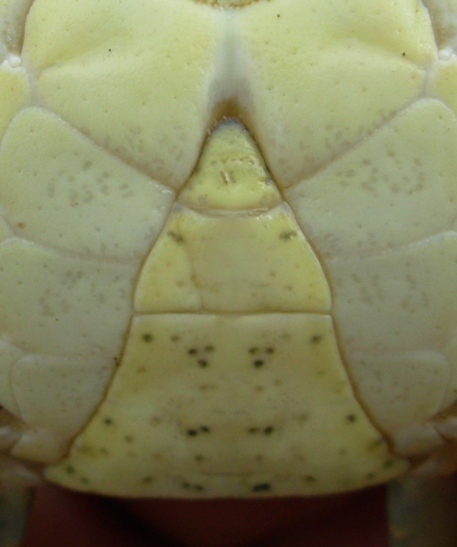 Carcinus maenas. Abdomen d'un mâle.